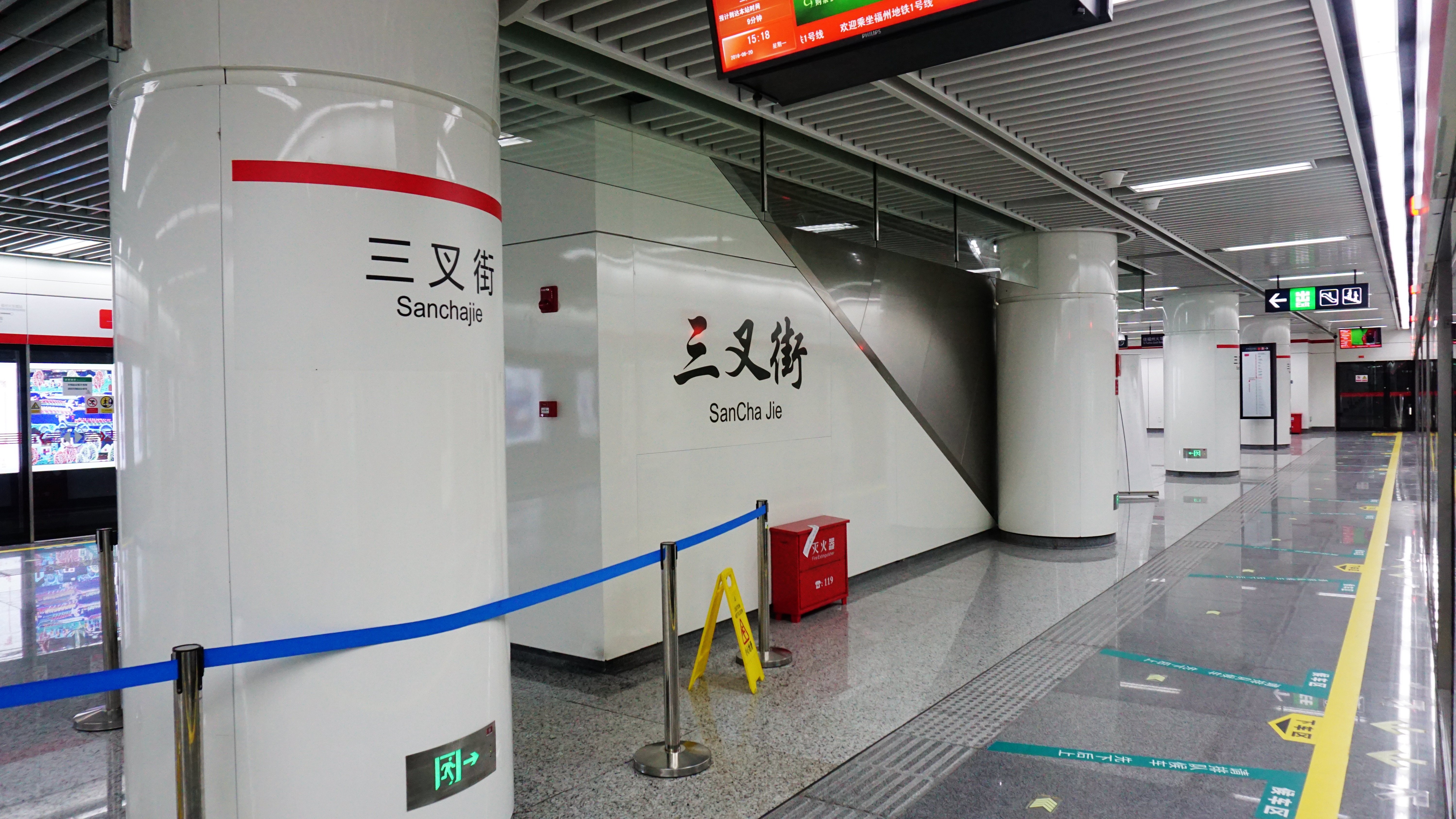 福州地铁三叉街站